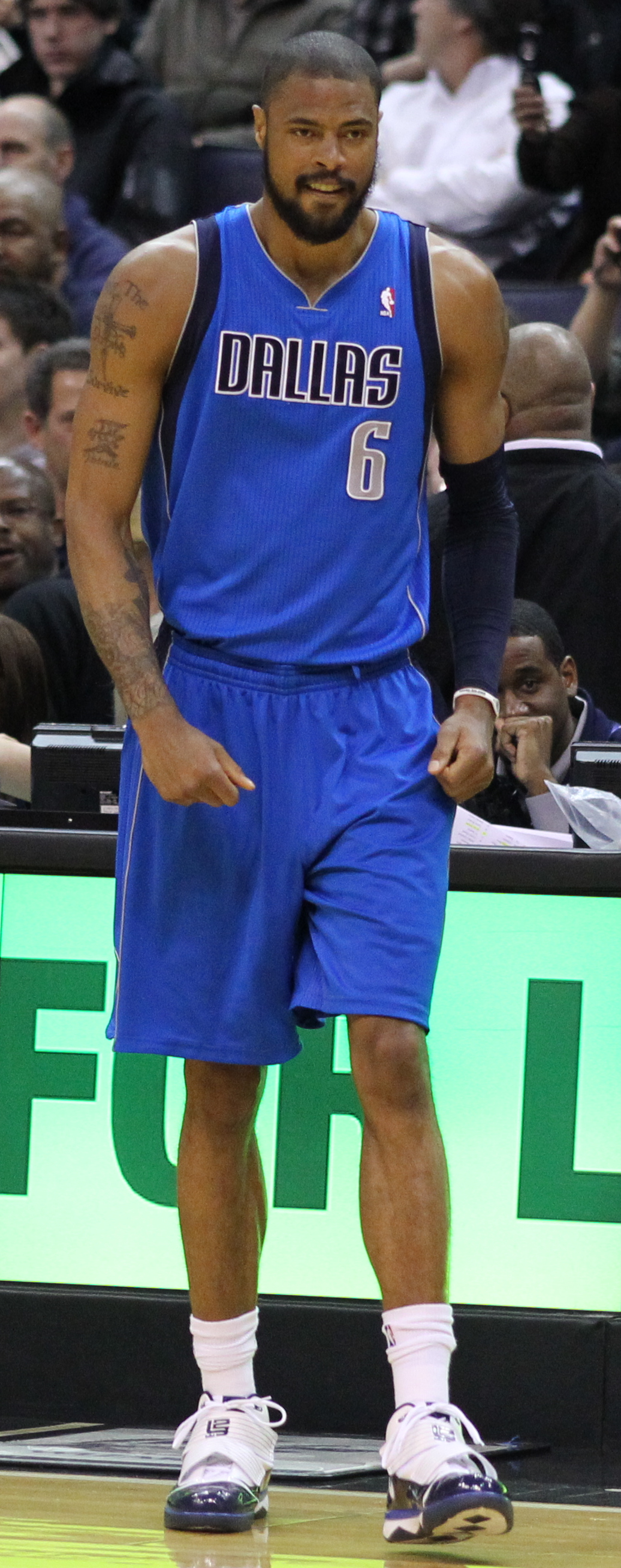 Wizards v/s Mavericks 02/26/11